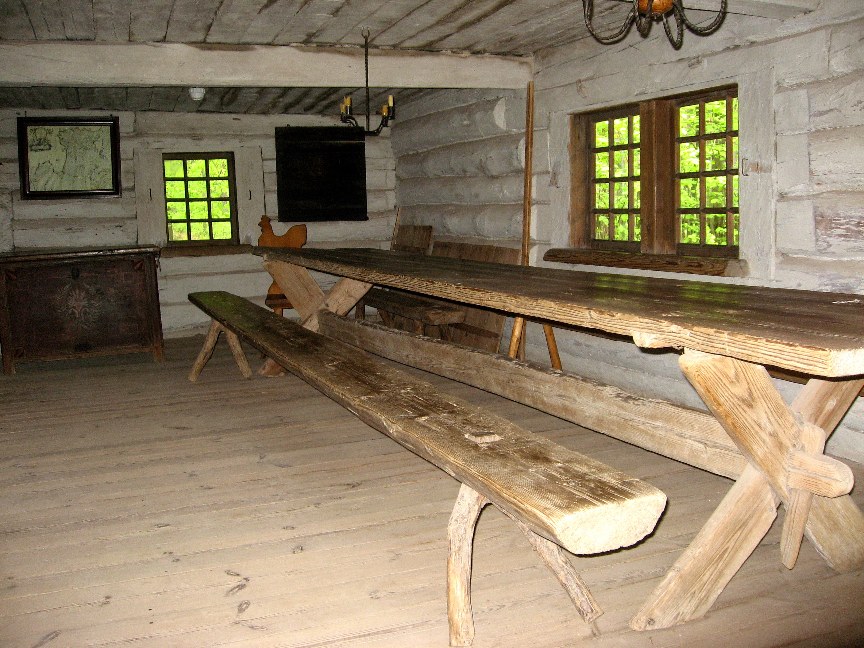 Lotyšské etnografické muzeum v přírodě